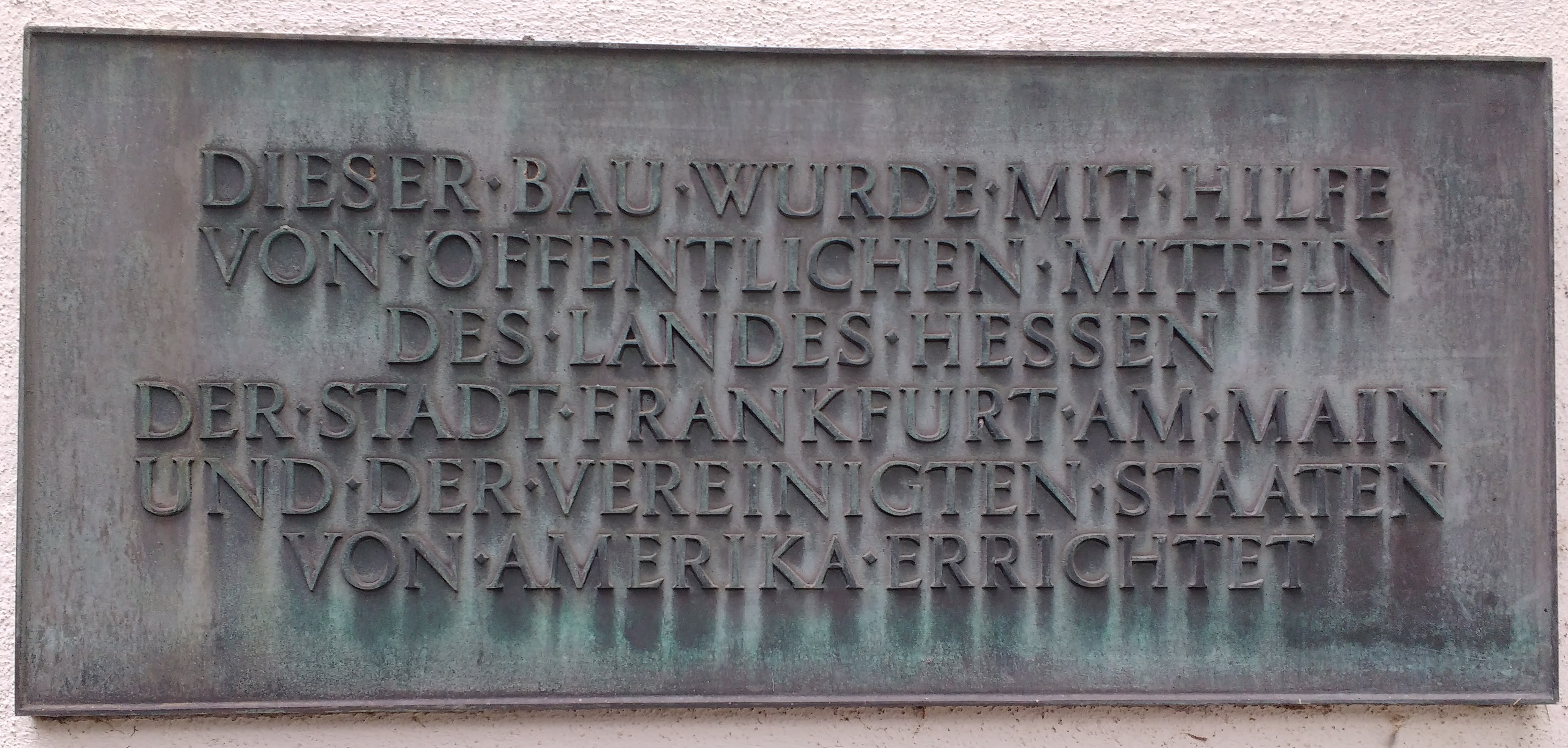 Erinnert an den Wiederaufbau des Institutsgebäudes und die damit verbundene Förderung im Rahmen des amerikanischen Reeducation-Programms.